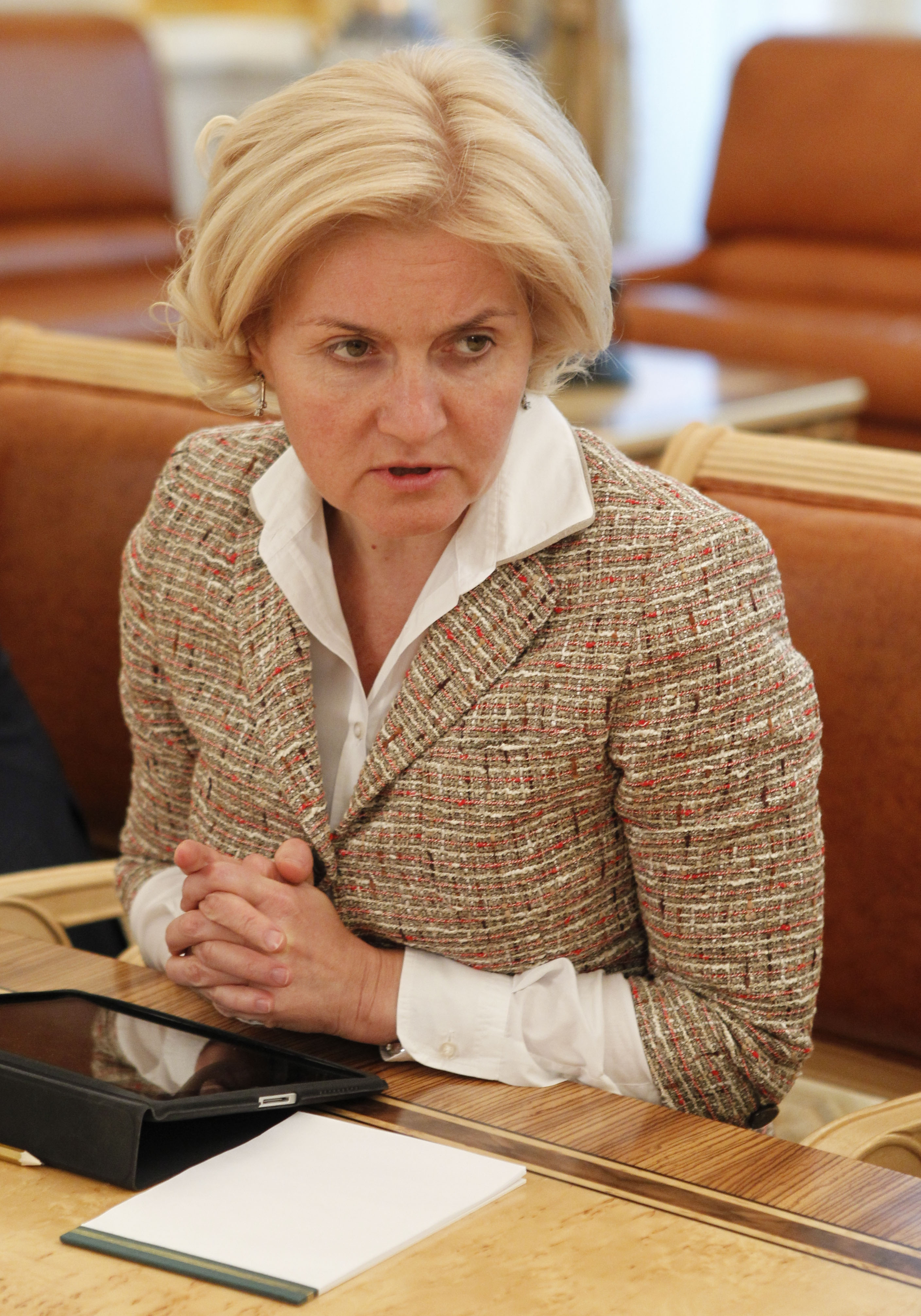 Заместитель Председателя Правительства Российской Федерации О. Ю. Голодец